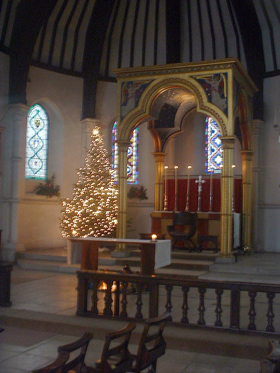 Inside St Johns East Dulwich